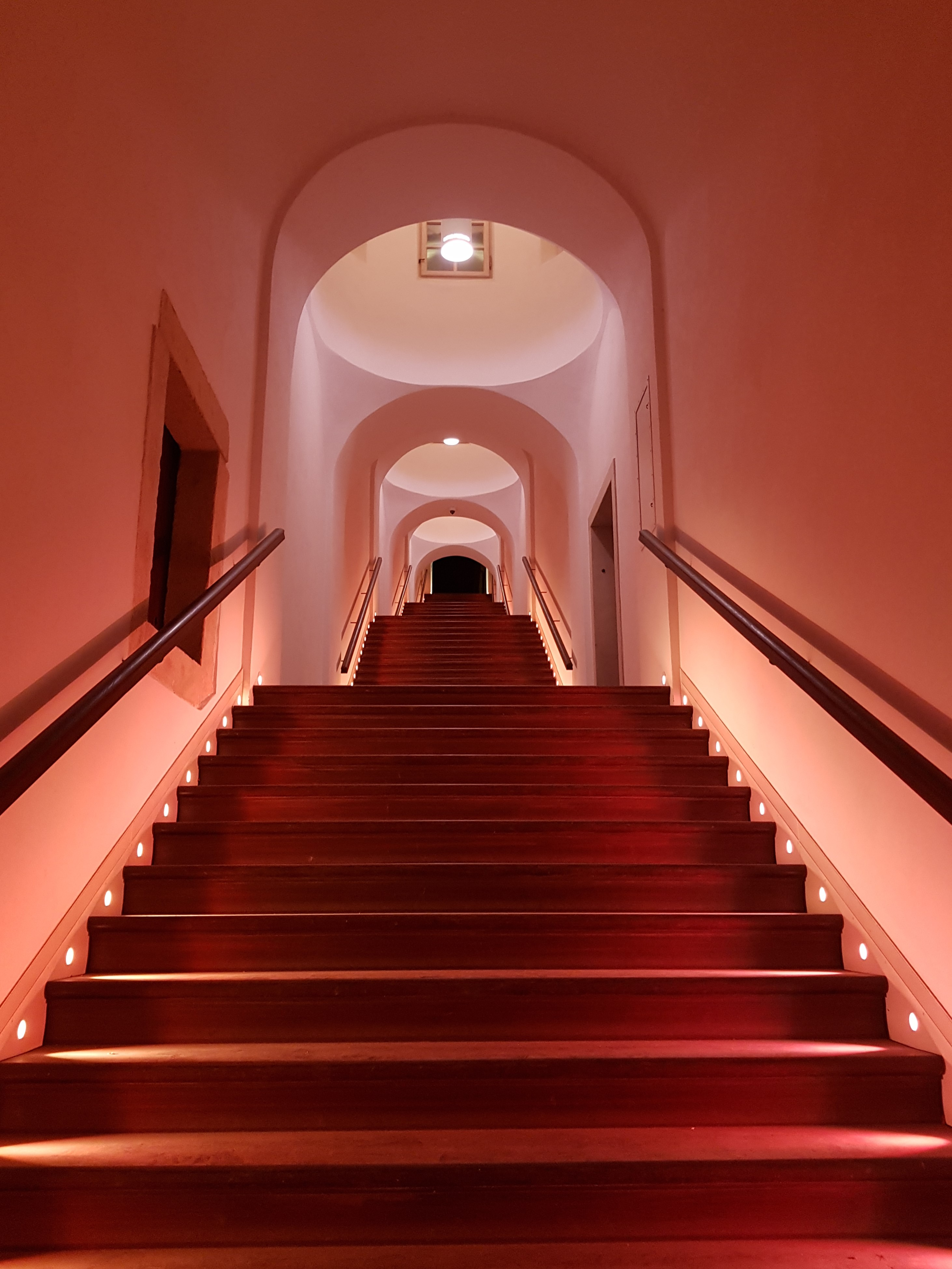 Bono publico - interiér v noci